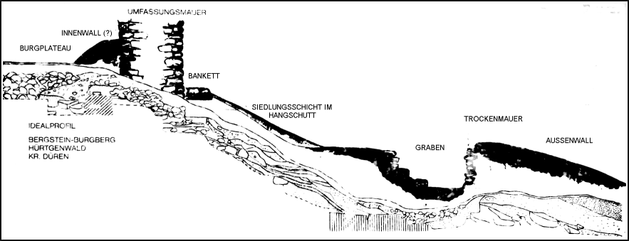 Mauerquerschnitt der Burg Berenstein.